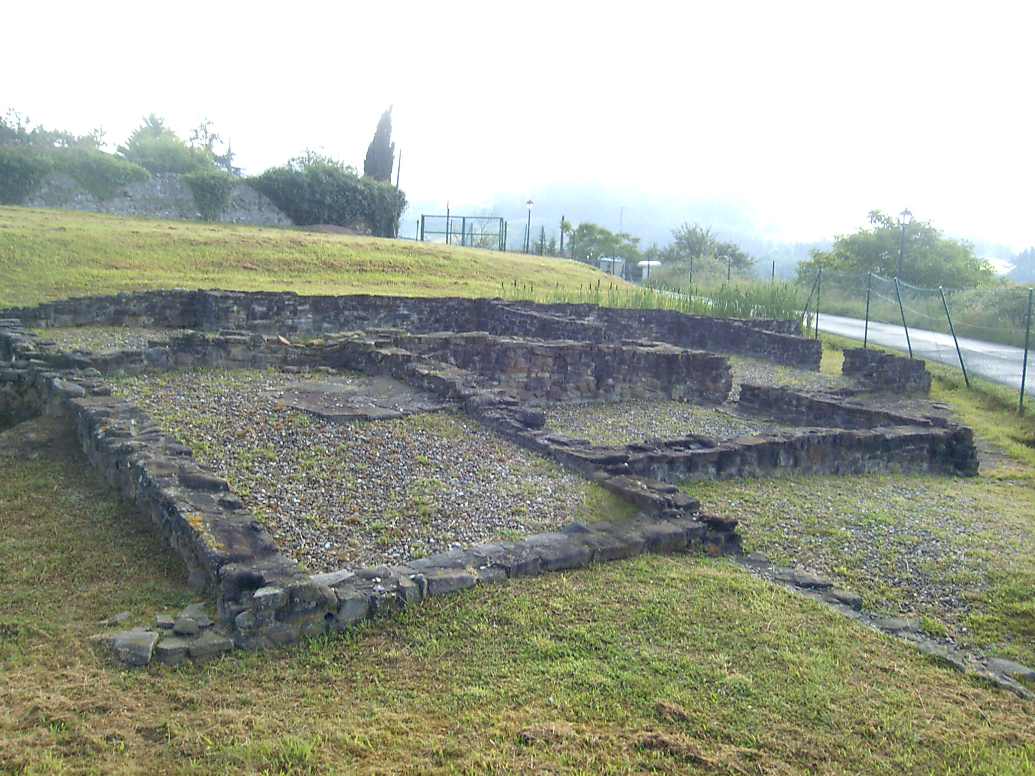 Forua erromatar herrizka